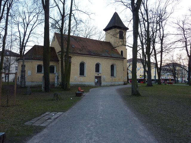 Regensburg: St. Peter vor dem Hauptbahnhof